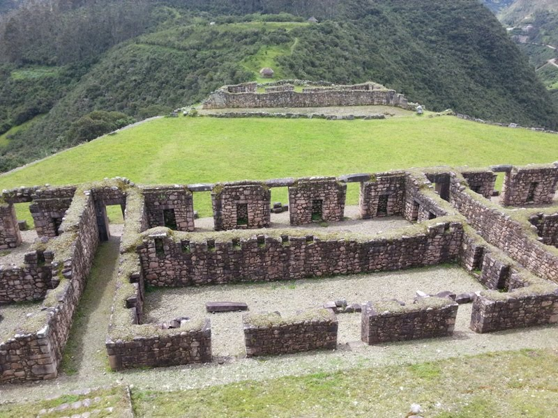 Inka Ruine in der Cusco Region, Peru